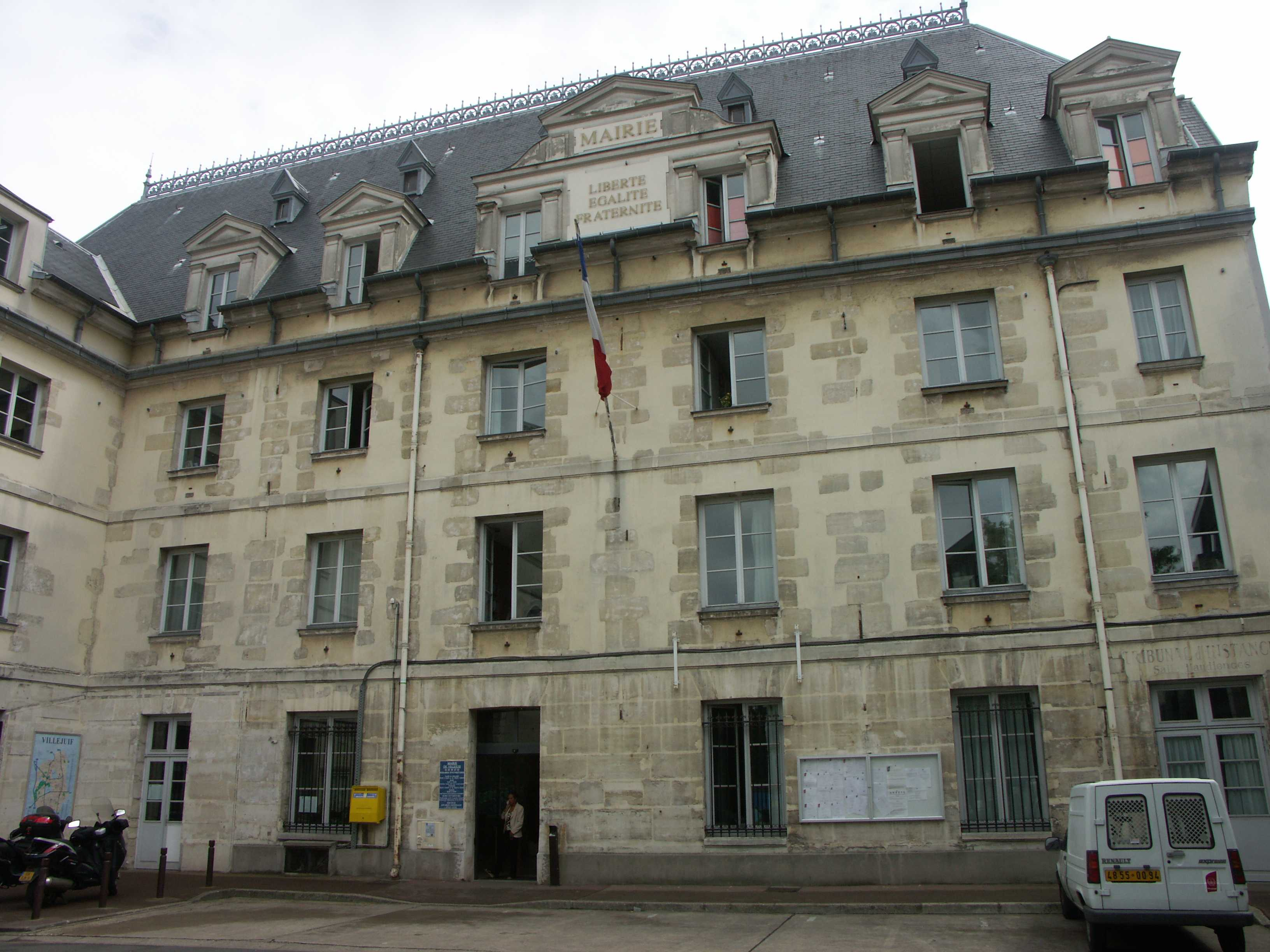 Mairie de Villejuif